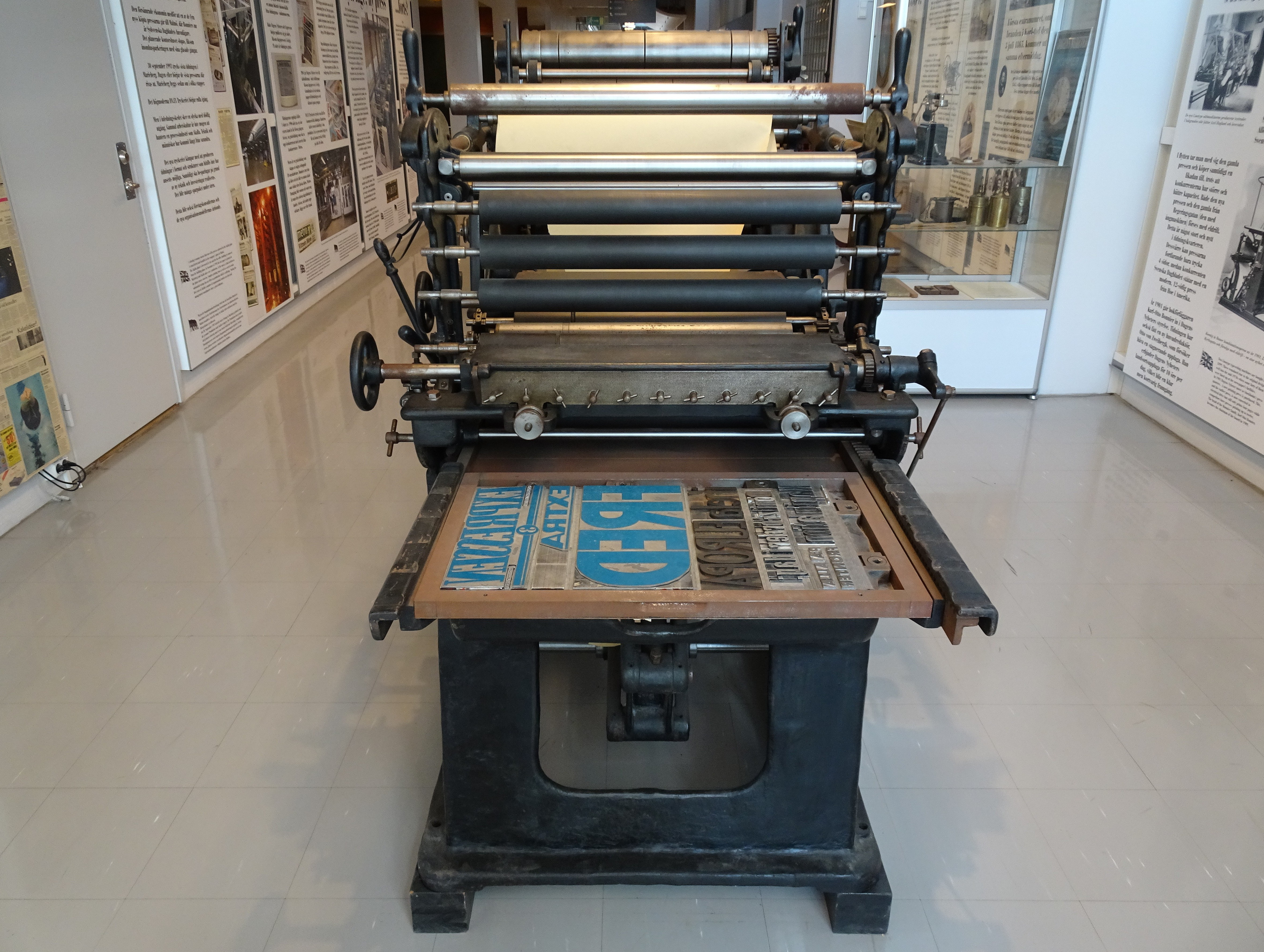 Löpsedelpress med Expressen-sida från 7 maj 1945